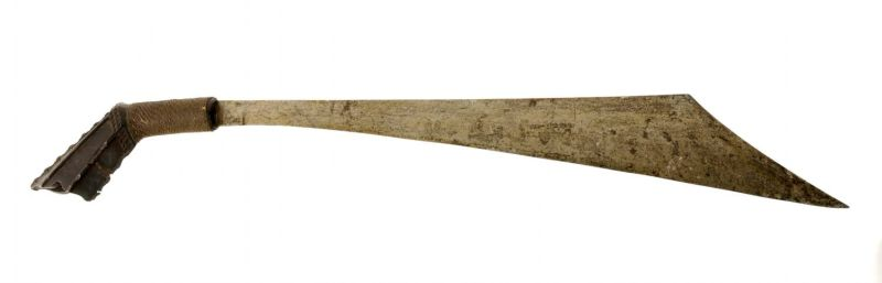 Zwaard. Slagzwaard met ijzeren lemmet Unknown language: Seruk